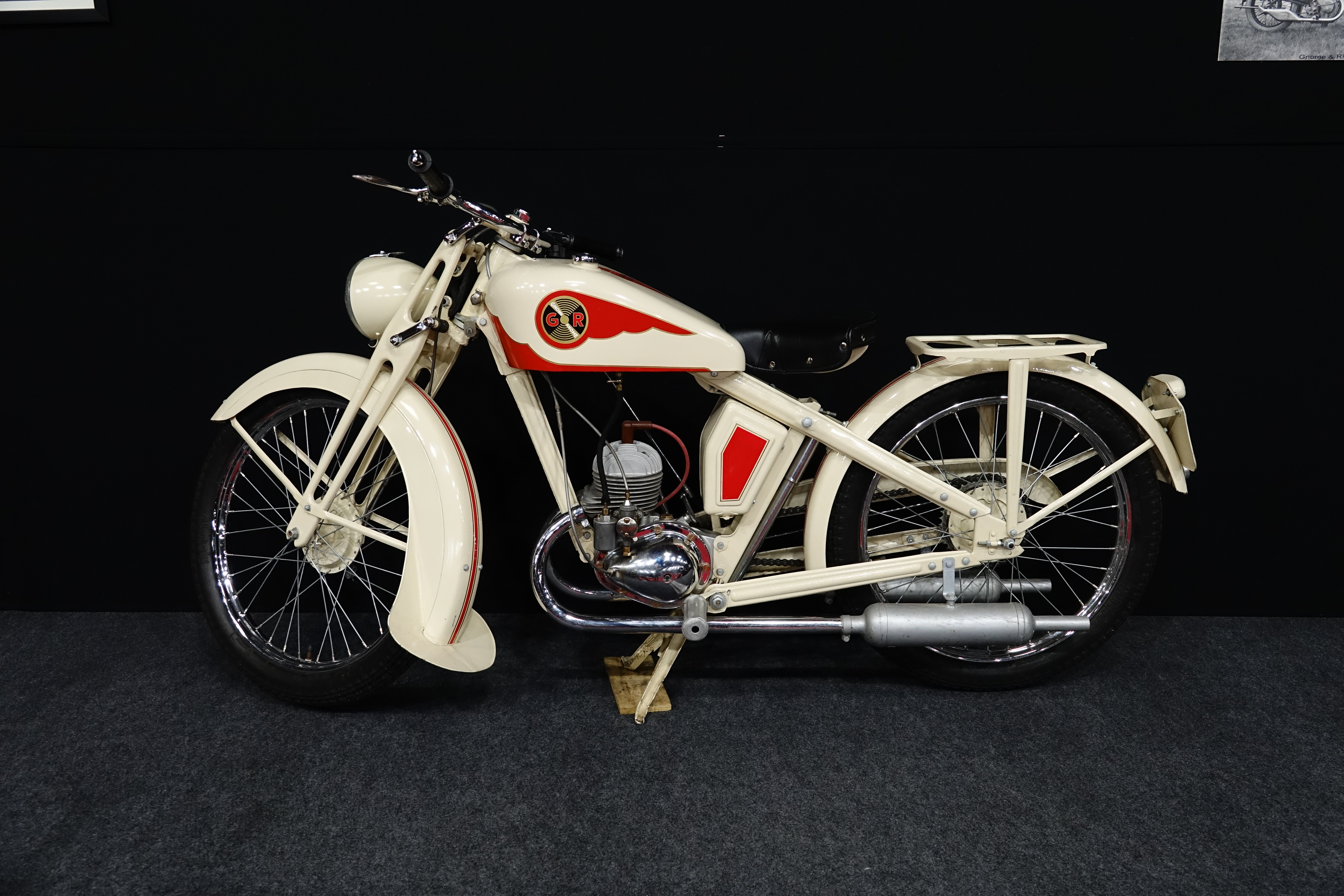 Gnome et Rhône à Rétromobile 2019